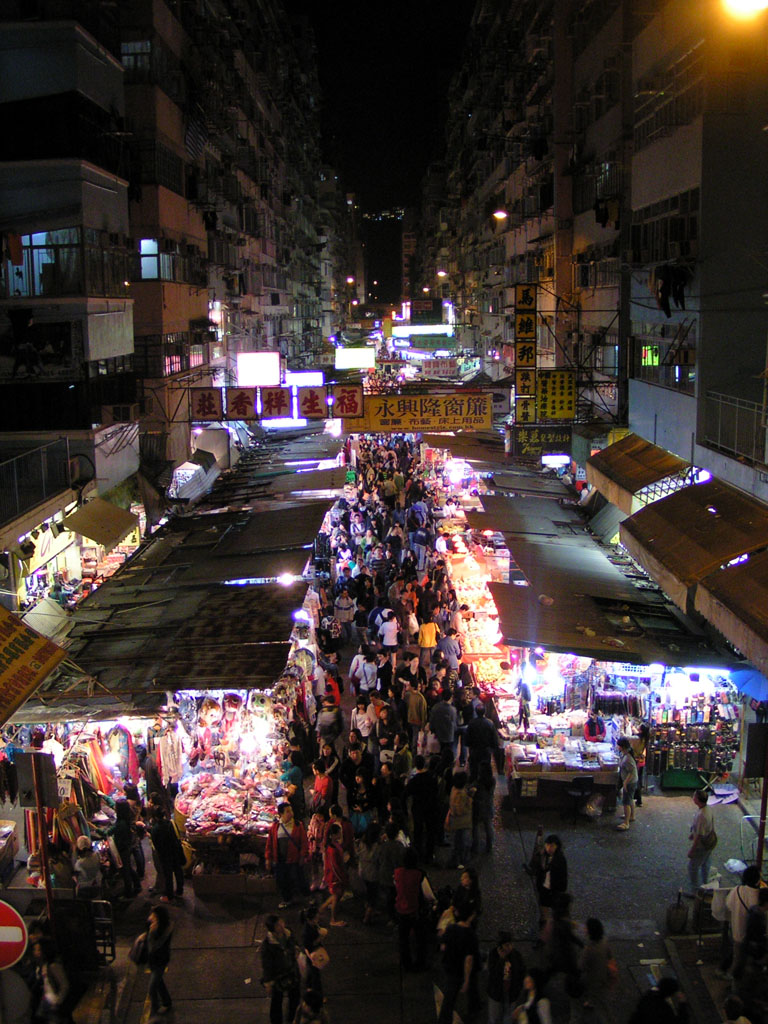 A night market in Mong Kok, Kowloon, Hong Kong